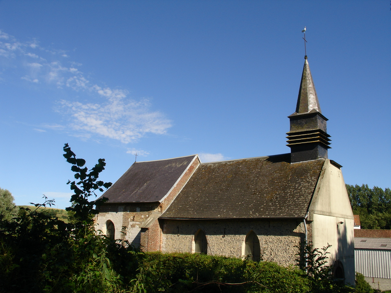 Église de Bimont